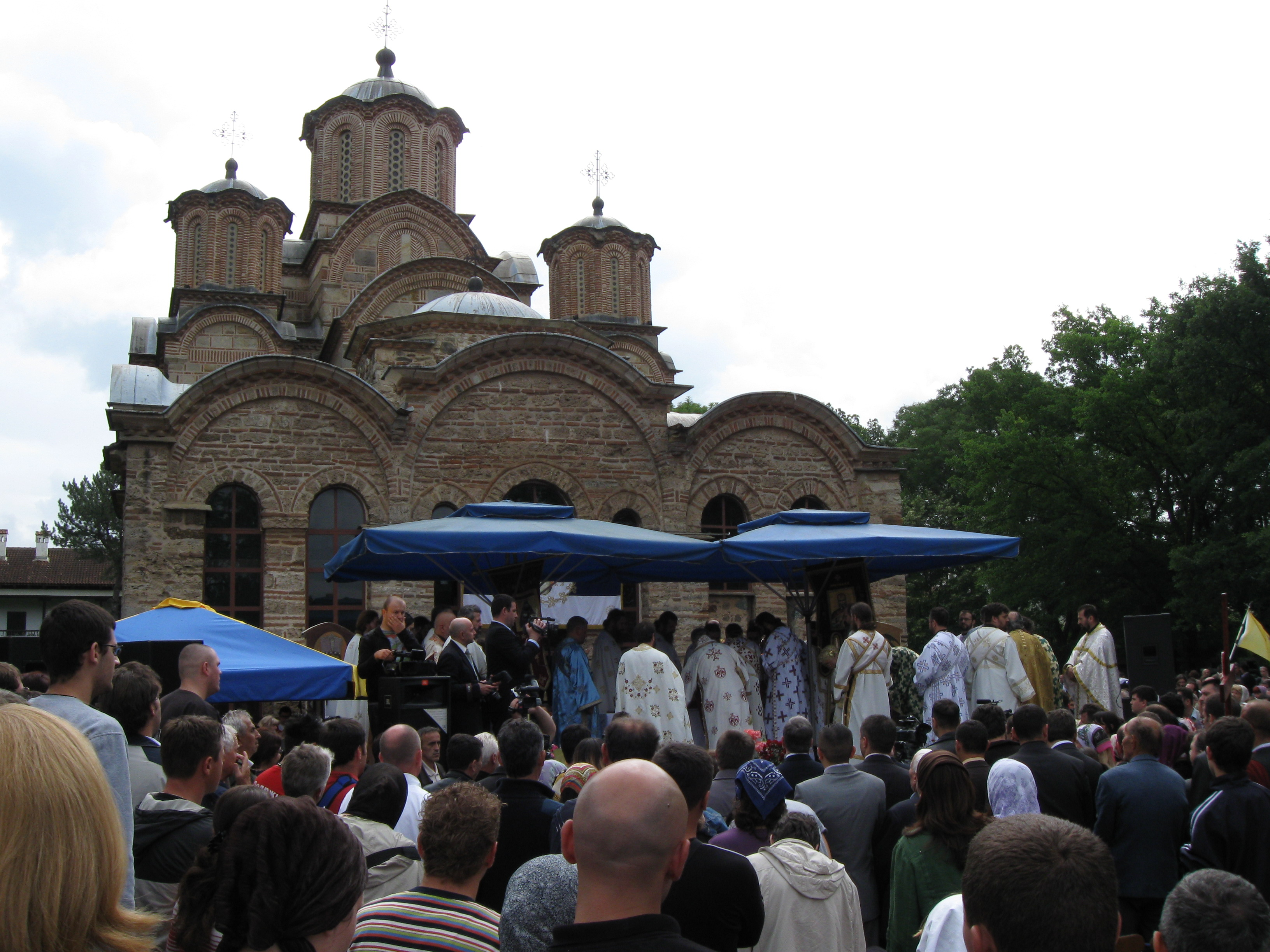 Liturgija u porti Gračanice na Vidovdan 2009.